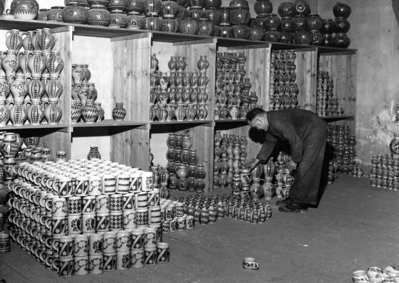 Höhr-Grenzhausen Fa. R. Merkelbach Sortieren am Lager, Lager in salzglasiertem Steinzug